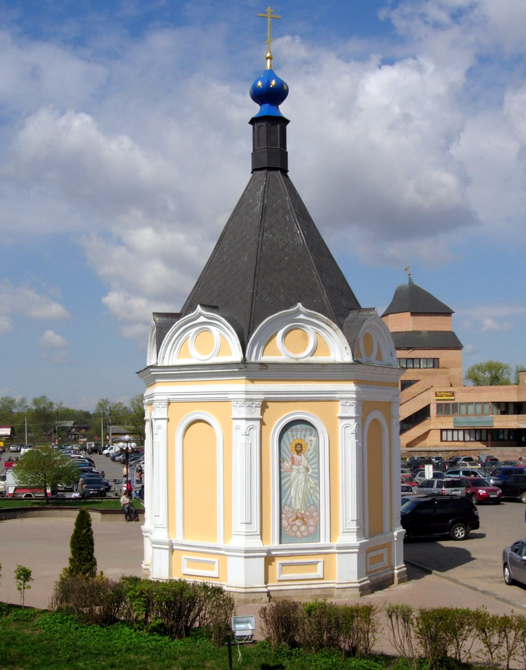 Часовня Александра Невского при Успенском кафедральном соборе (Дмитров)